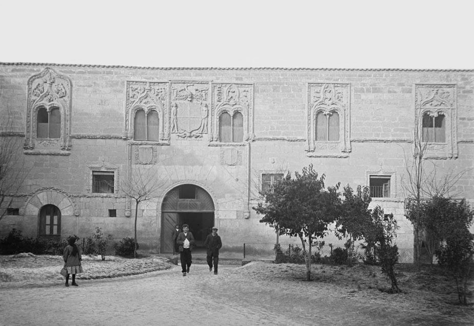 Imatge